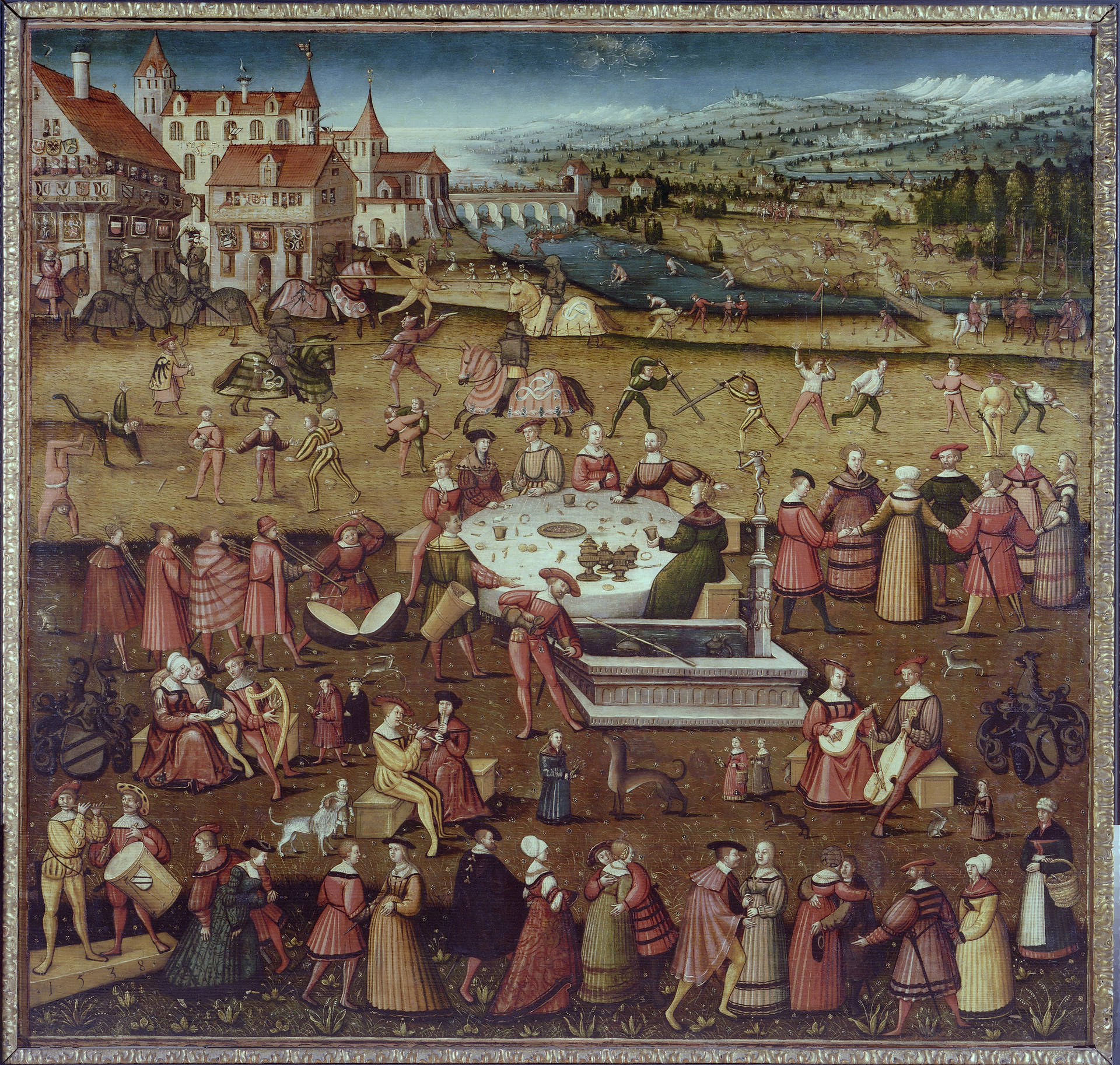 Rothenburger Patrizierfest, 1538, Ölmalerei auf Holz